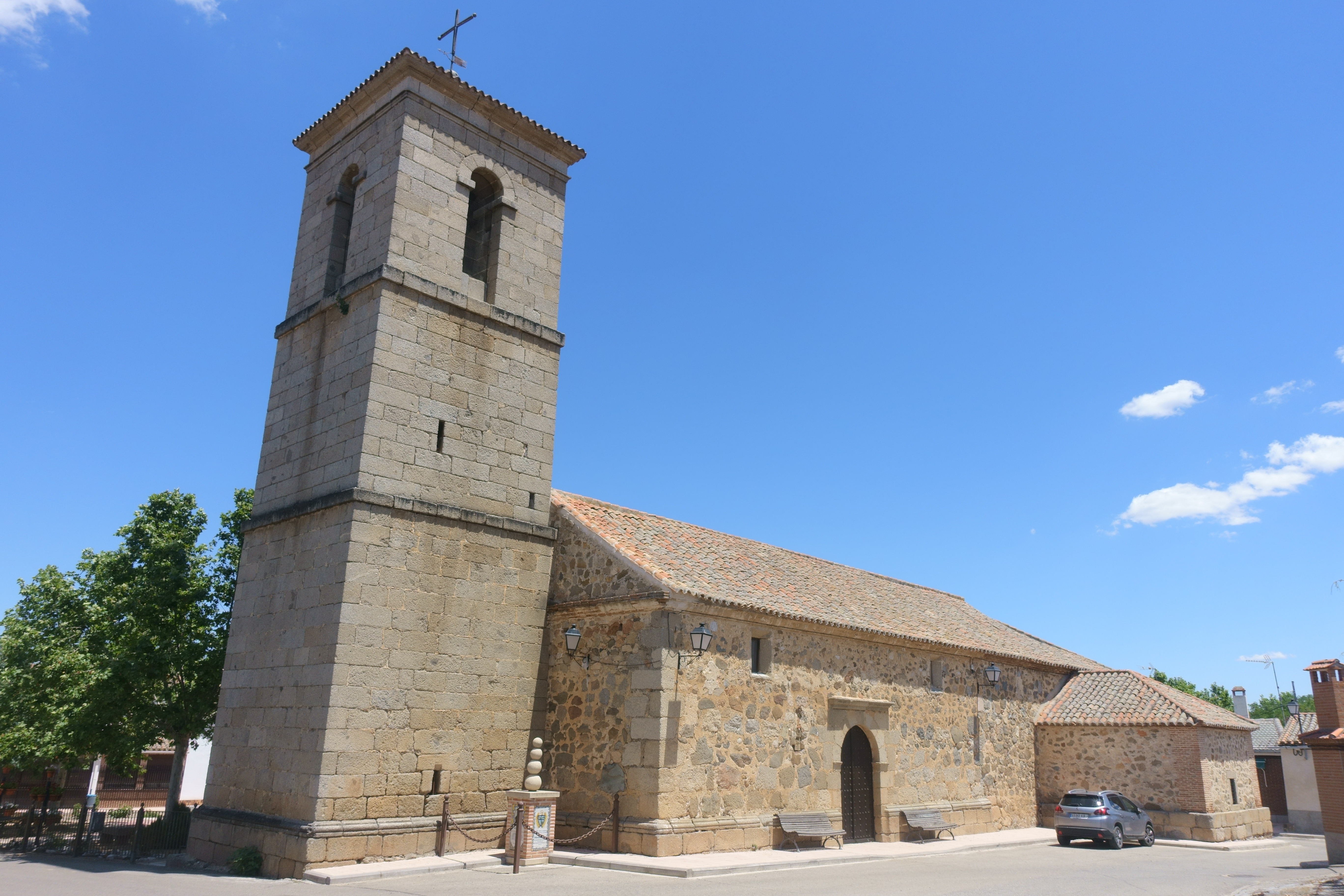 Iglesia de Nuestra Señora de la Paz, Villarejo de Montalbán (Toledo, España).